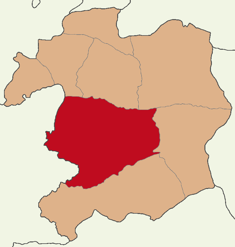 Bingöl Merkez ilçesinin konumu